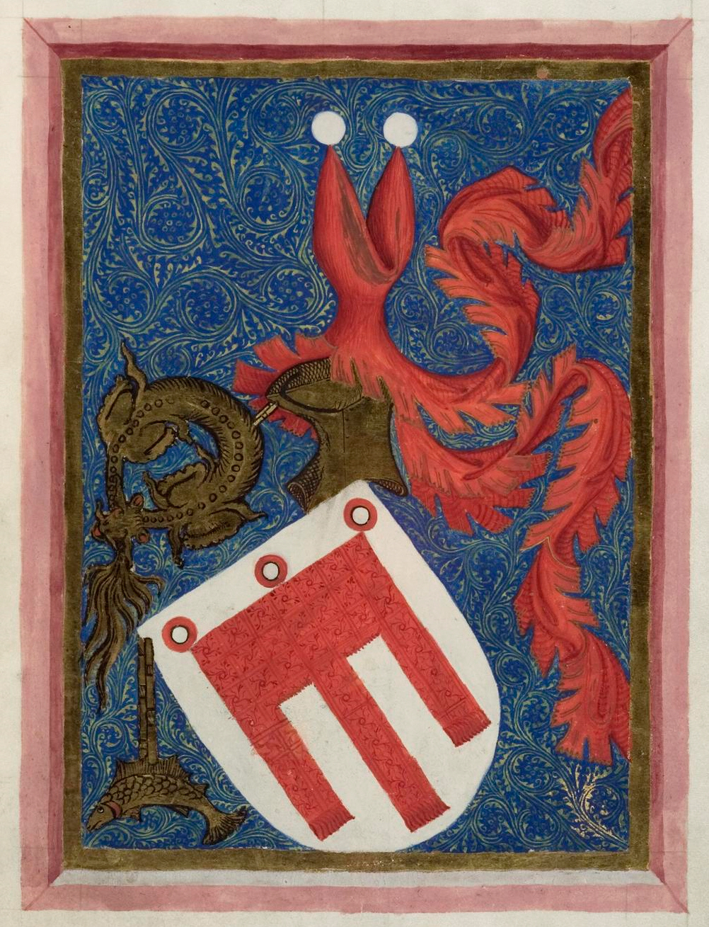 Wappen Hugos von Montfort in der Handschrift Cod. Pal. germ. 329 Hugo von Montfort: Lieder, Briefe und Reden, Steiermark, 1414/1415, Seite: 54r